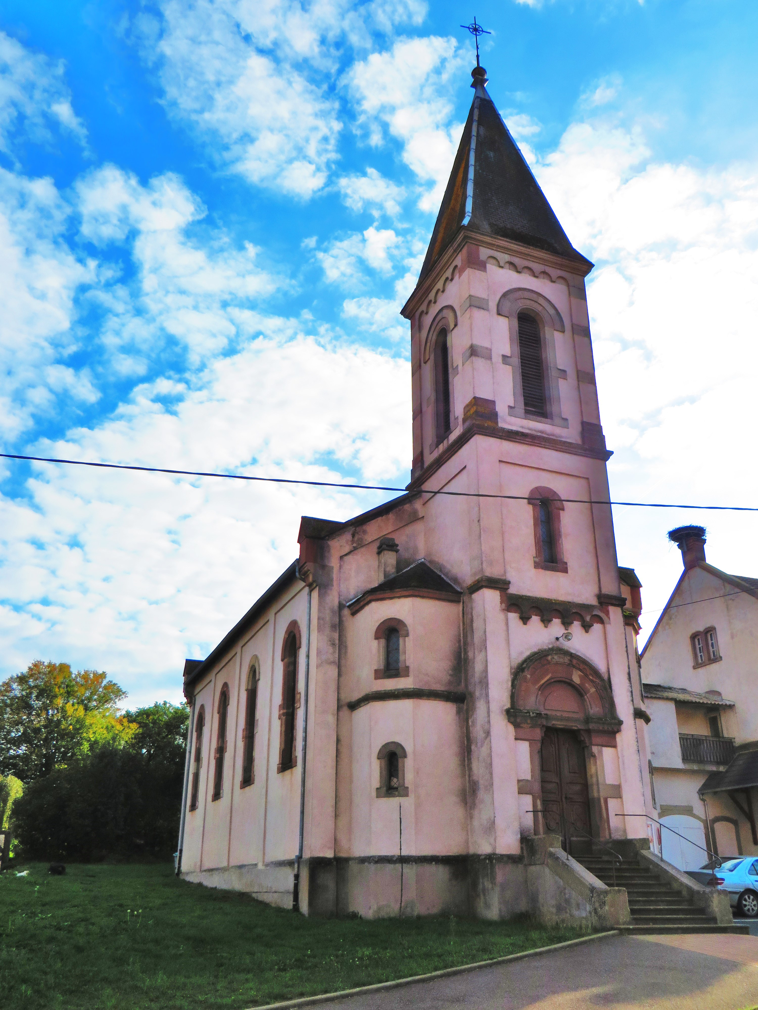 Vibersviller temple